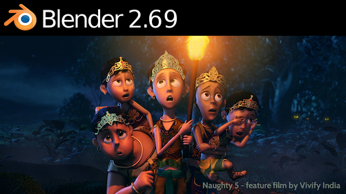 Blender 2.69 Splash Blender Foundation - Blender